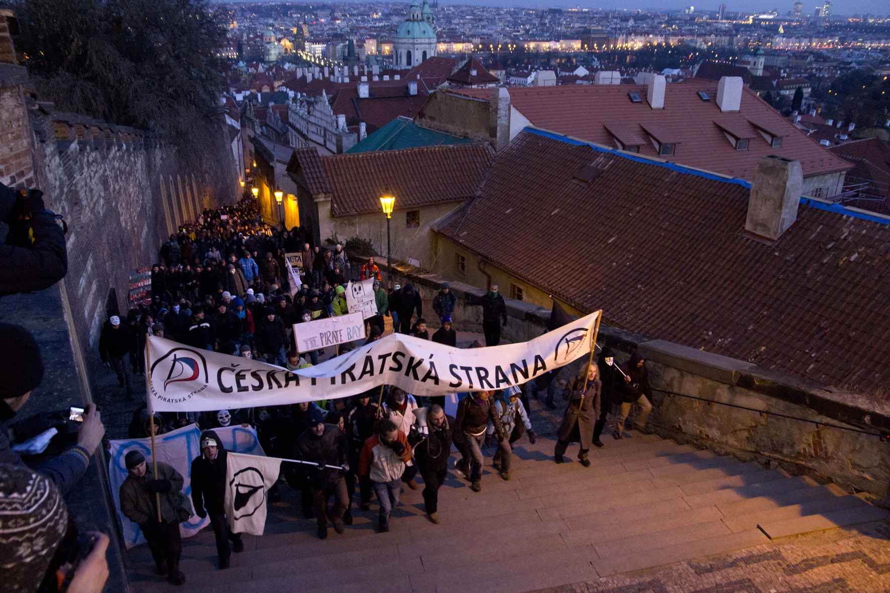 Demonstrace proti dohodě ACTA pořádaná Českou pirátskou stranou. V Praze 2. února 2012.